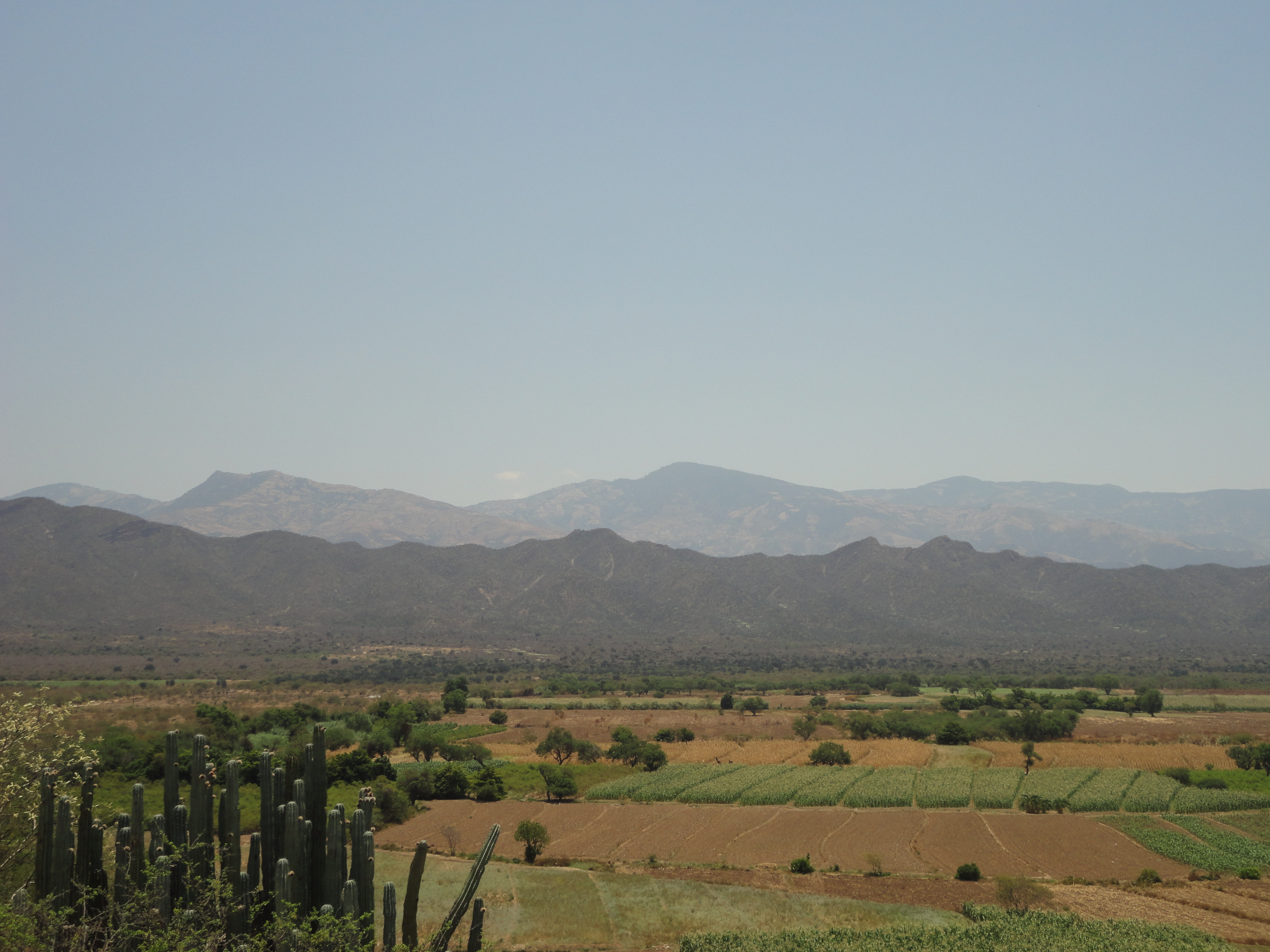 Campo de cultivo al sur de Zinacatepec visto desde la Iglesia del Cerrito